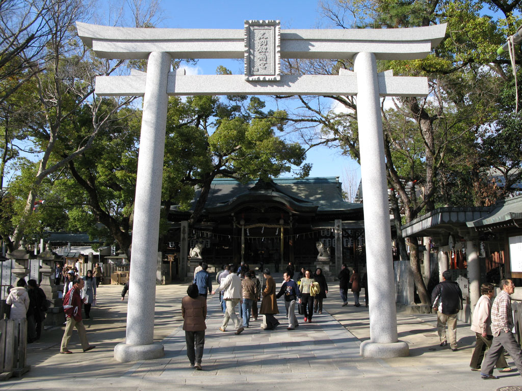 石切剣箭神社